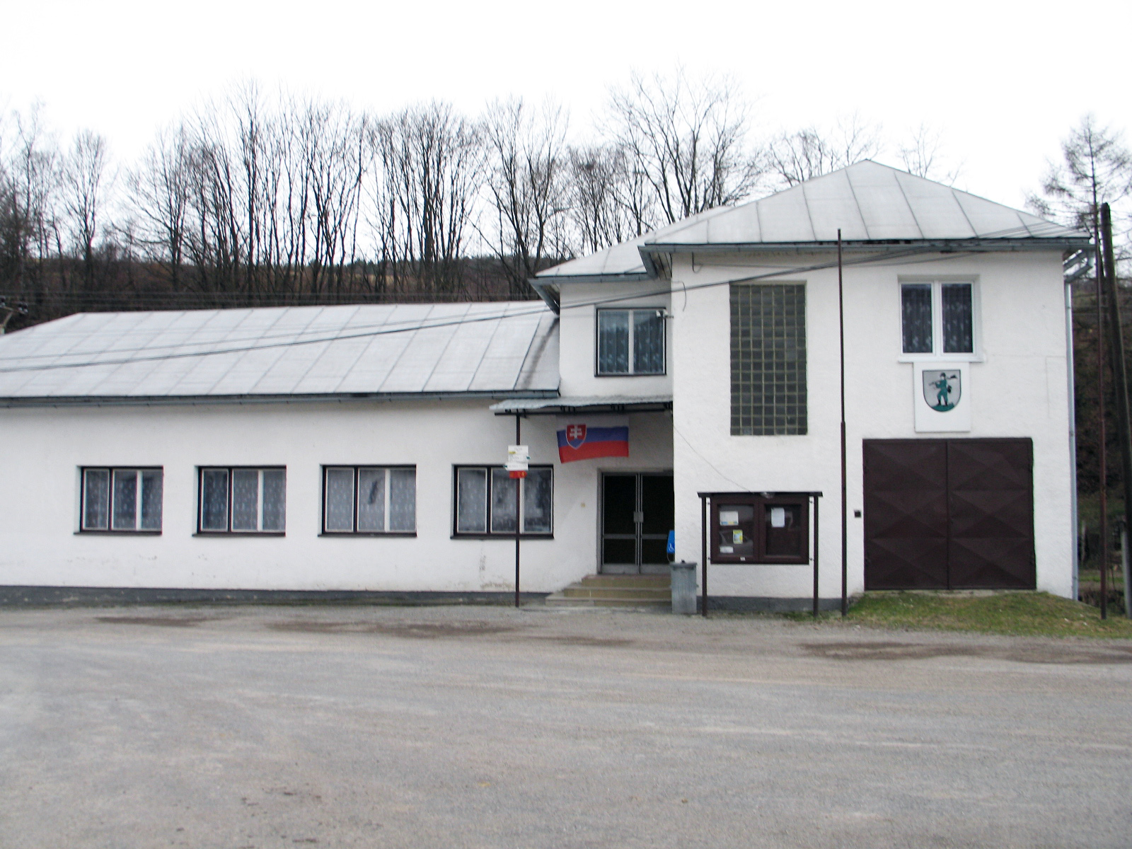 Budova obecného úradu vo Vyšnej Pisanej